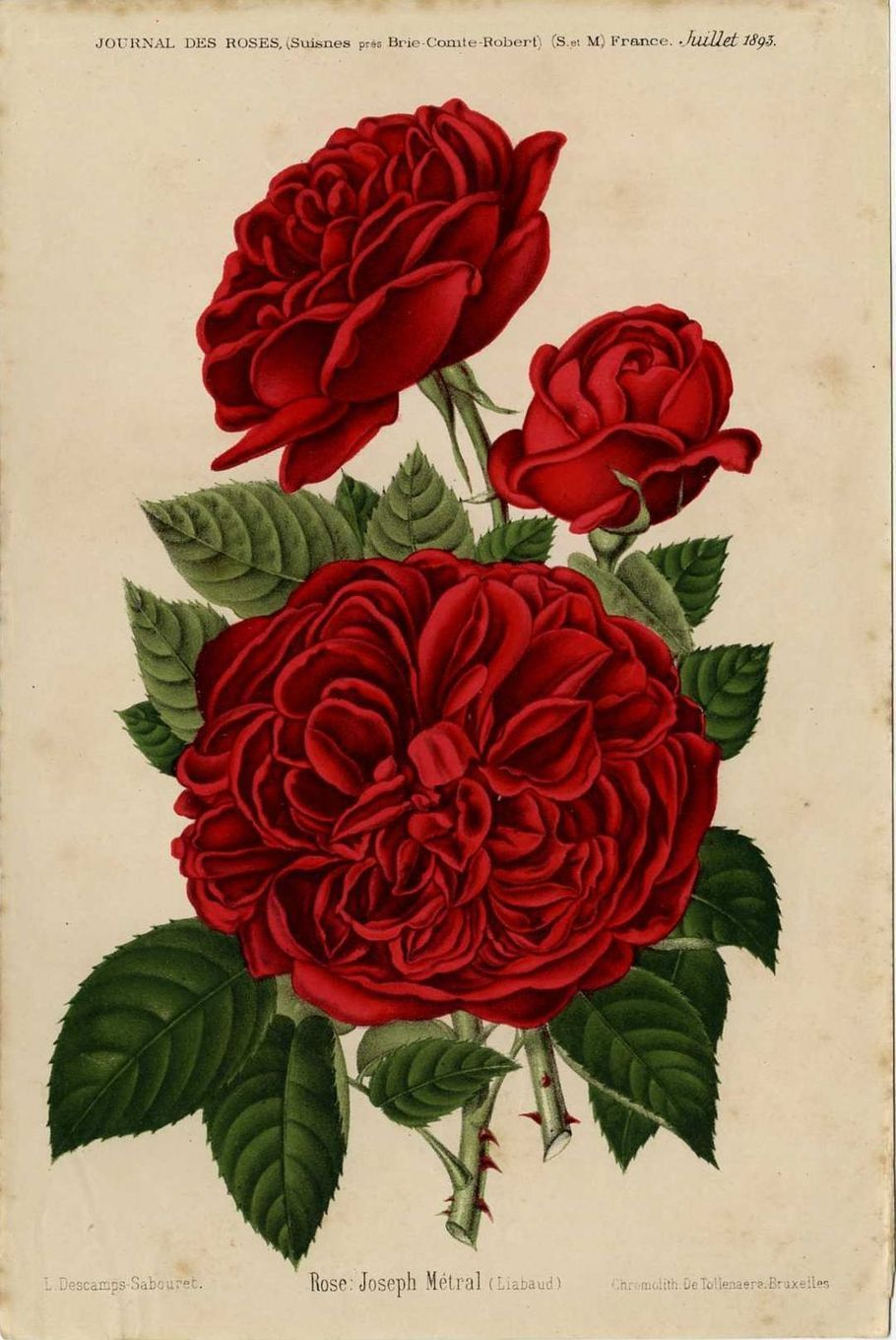 Rose 'Joseph Métral ' (Bernaix & Liabaud 1887), illustration de Louise Descamps-Sabouret dans le Journal des roses (juillet 1893).